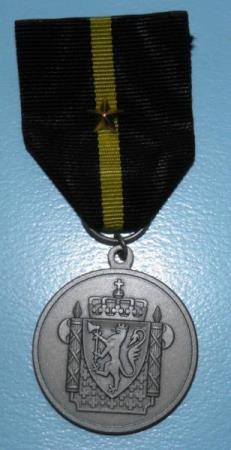 Норвежская медаль "За службу в полиции"